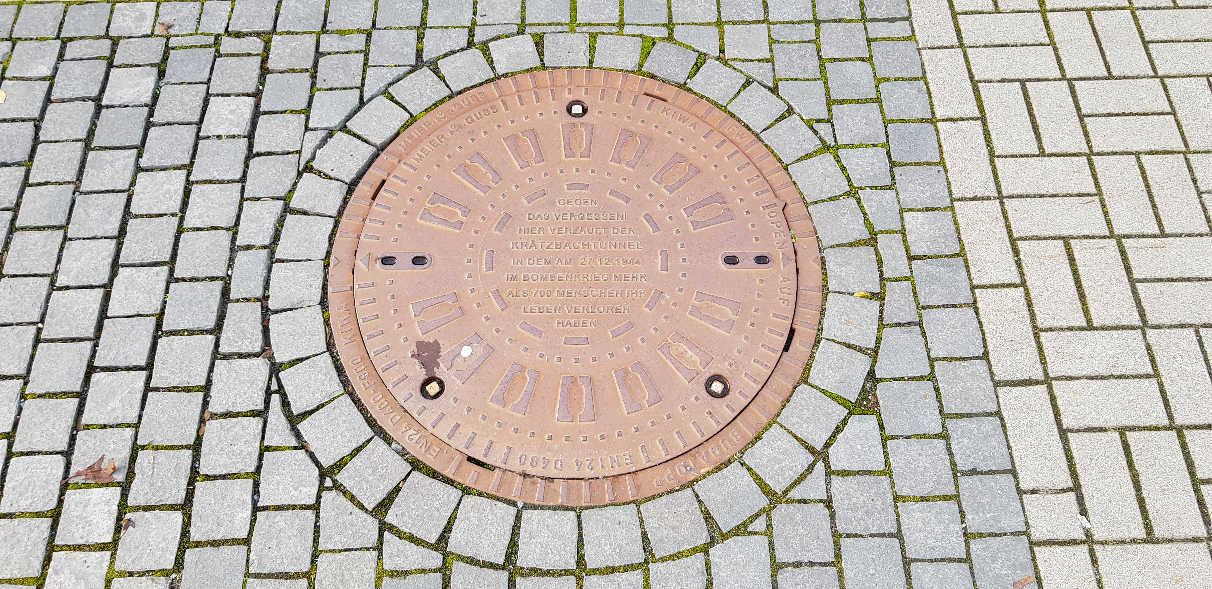 Kanaldeckel zum Gedenken der Opfer im Krätzbachtunnel beim Luftangriff am 27. Dezember 2019. Standort: Heidelsteinstraße, Fulda